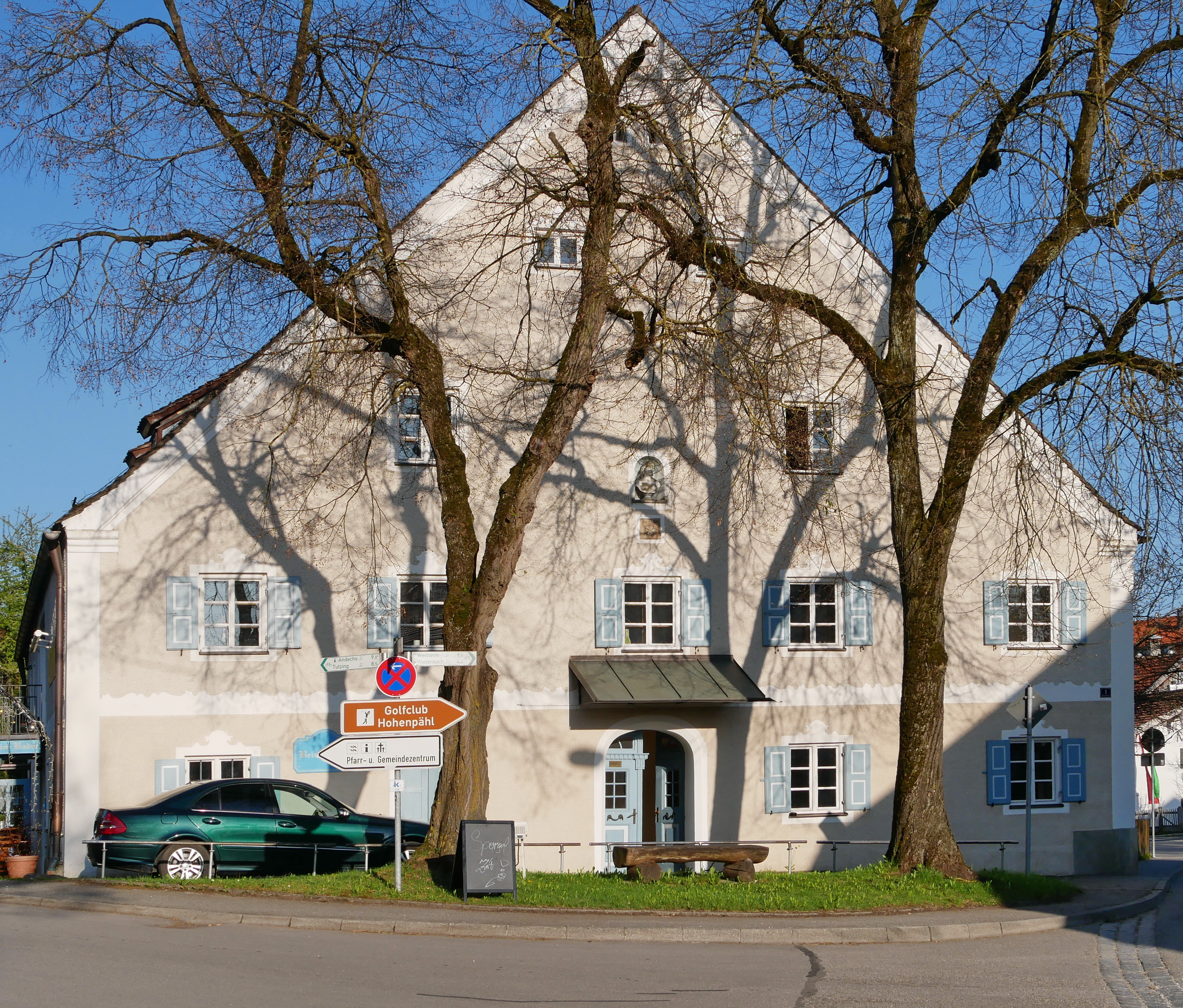 Pähl, Kirchstr. 1: Ehemalige Mühle aus dem Jahr 1812 (Bezeichnung s. Bild 002). Ansicht von W